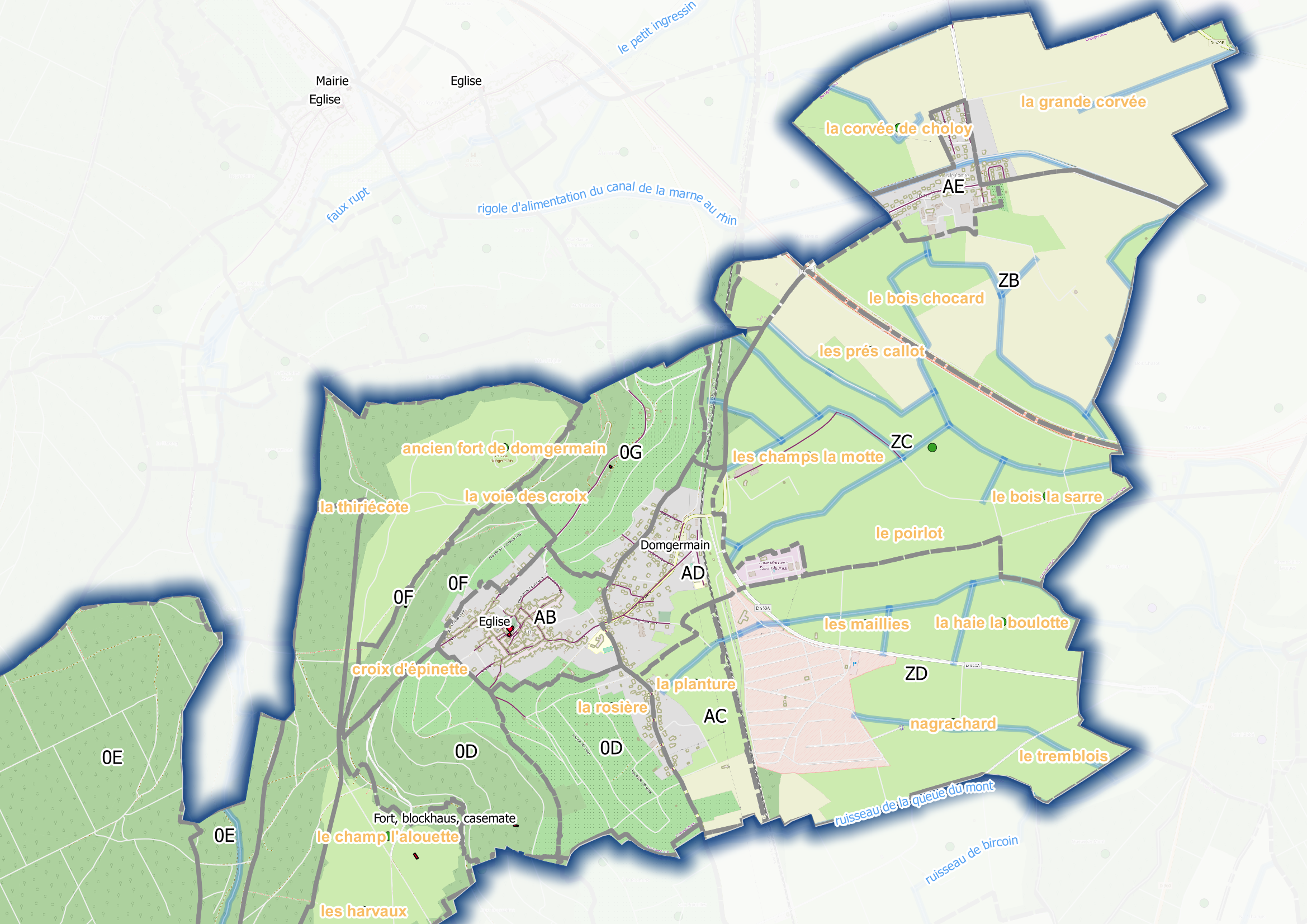 Domgermain, ban communal (Qgis et OpenstreetMap)